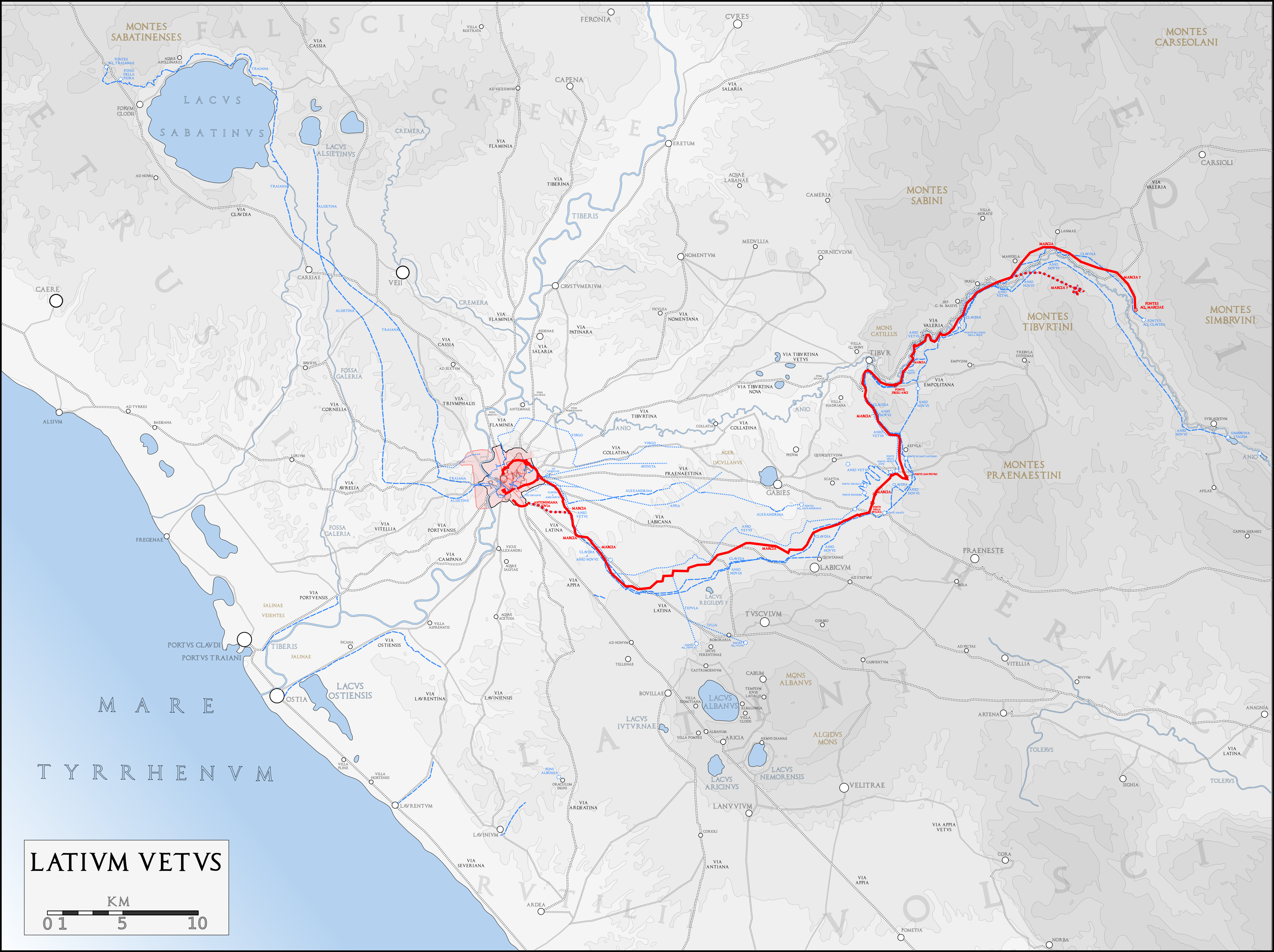 Carte du Latium antique sur lequel figure le tracé des aqueducs de Rome. D'après un fond de carte de 1886 (G. Droysens Allgemeiner Historischer Handatlas).